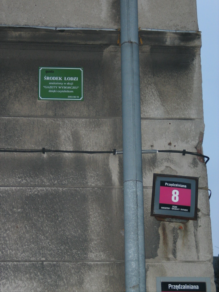 Tablica informująca o geograficznym środku Łodzi